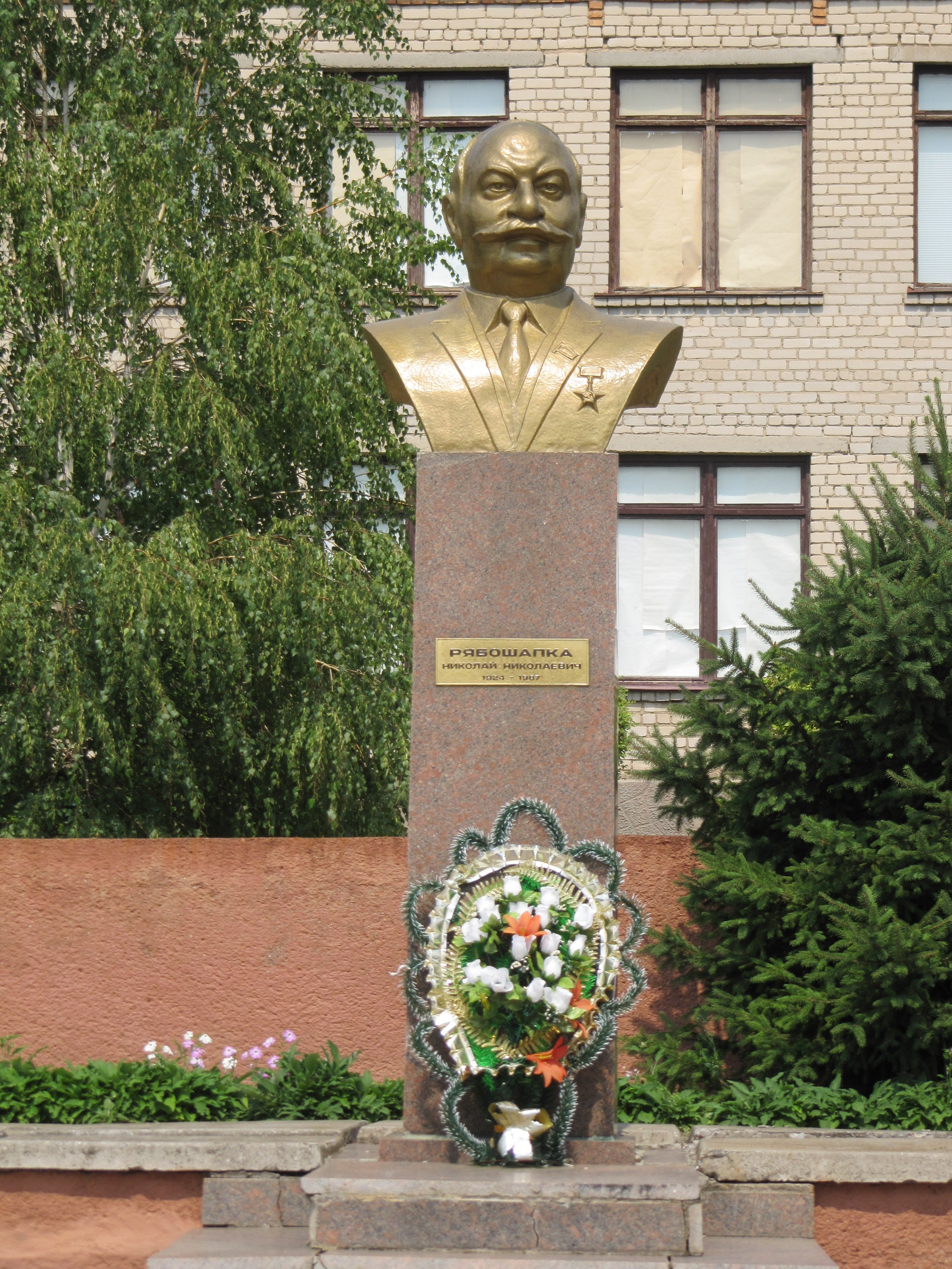 Вознесенський район, село Щербані, пам'ятний знак Миколі Рябошапка Миколаївська весна у Вікіпедії